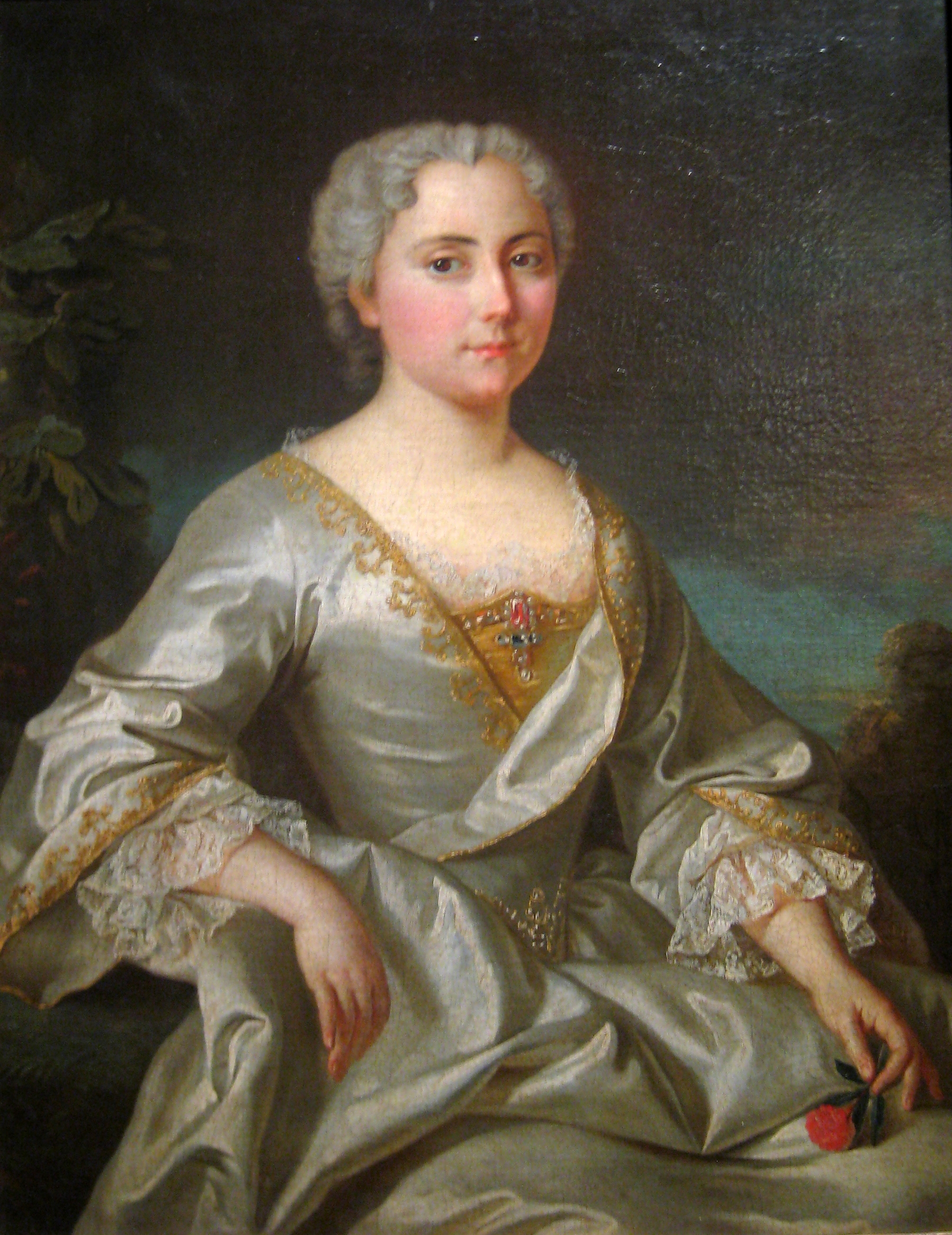 Пьер Сюблейра. Портрет Марии Феличи Тибальди, первая половина 18 века. Курская галерея